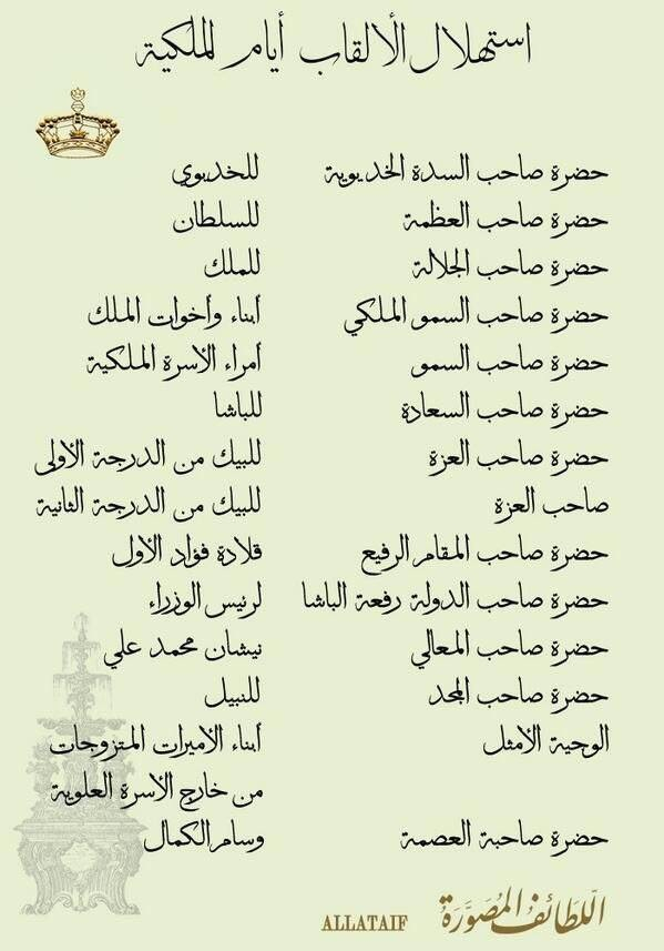 مصرى: الألقاب فى مصر الملكيه